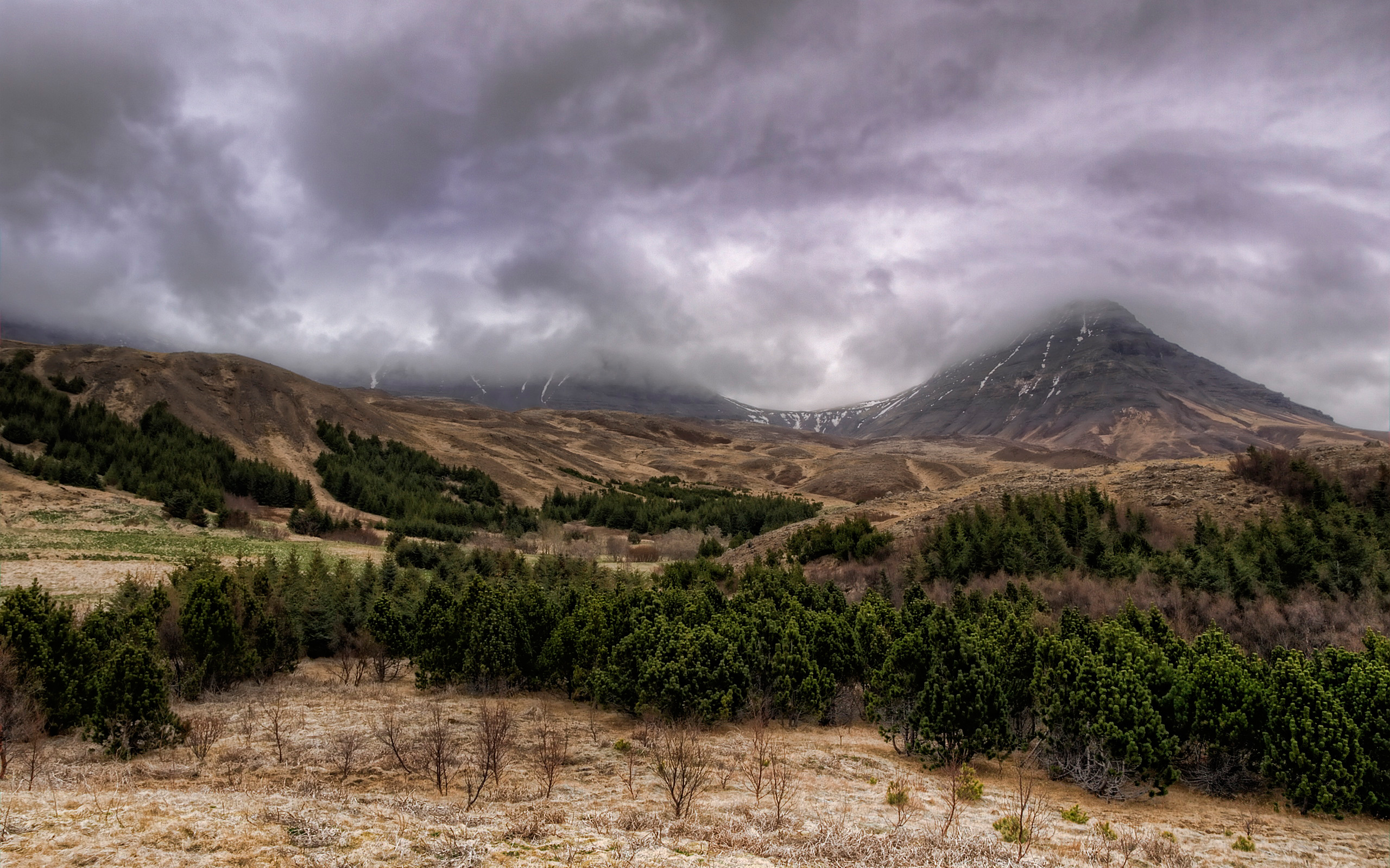 Gunnlaugsskarð